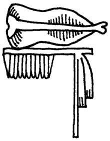 ლეტოპოლისი